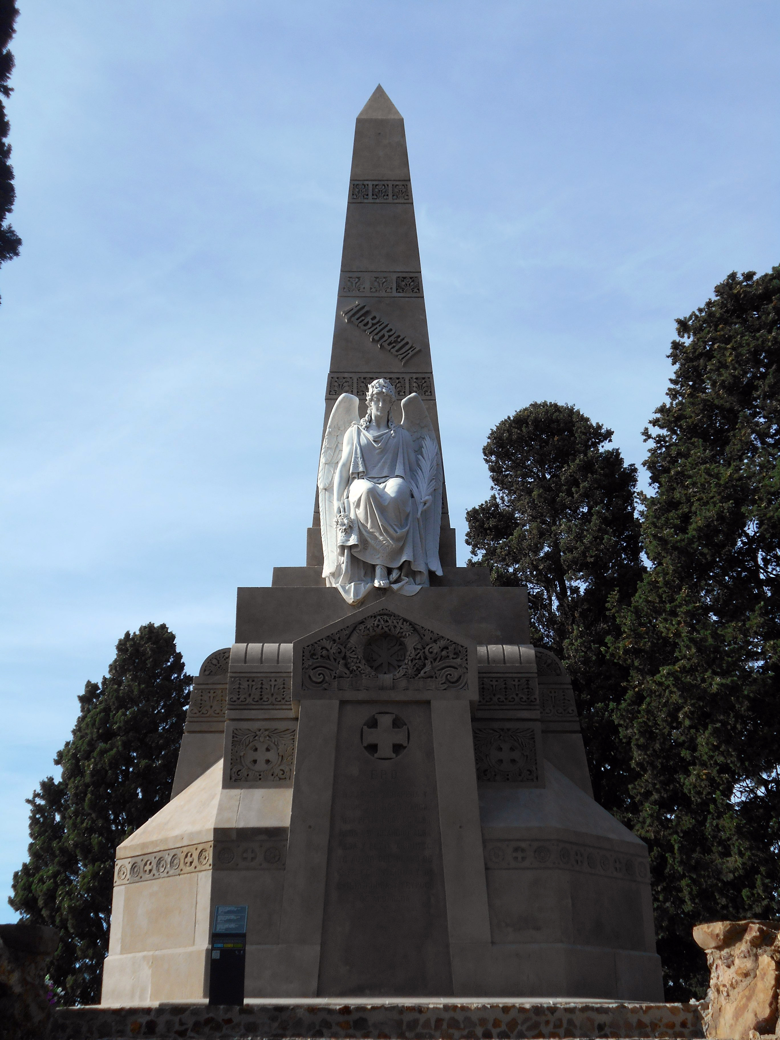 Panteón de Leandre Albareda, cementerio de Montjuïc. Obra del mismo Albareda en colaboración con Antoni Rovira i Rabassa, y escultura de Manuel Fuxà y Josep Campeny.